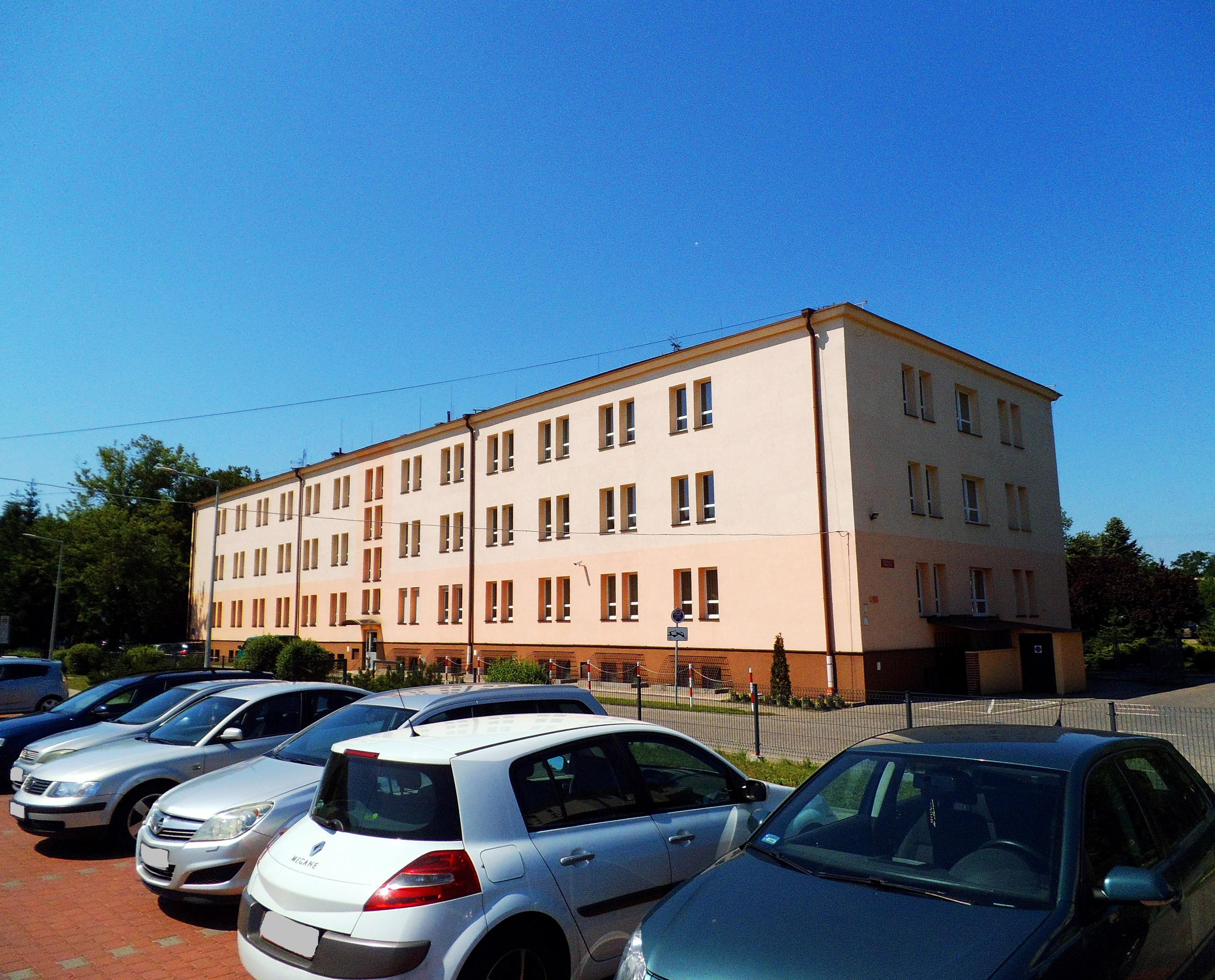 Internat ZSPS i VIII LO w Toruniu